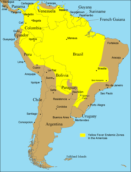 Gelbfieber in Südamerika 2005. Yellow fever in South America in 2005.